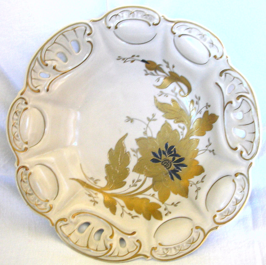 Ein Zier-Teller (1950er-Jahre), hergestellt von der Porzellanfabrik Schlegelmilch in Langewiesen